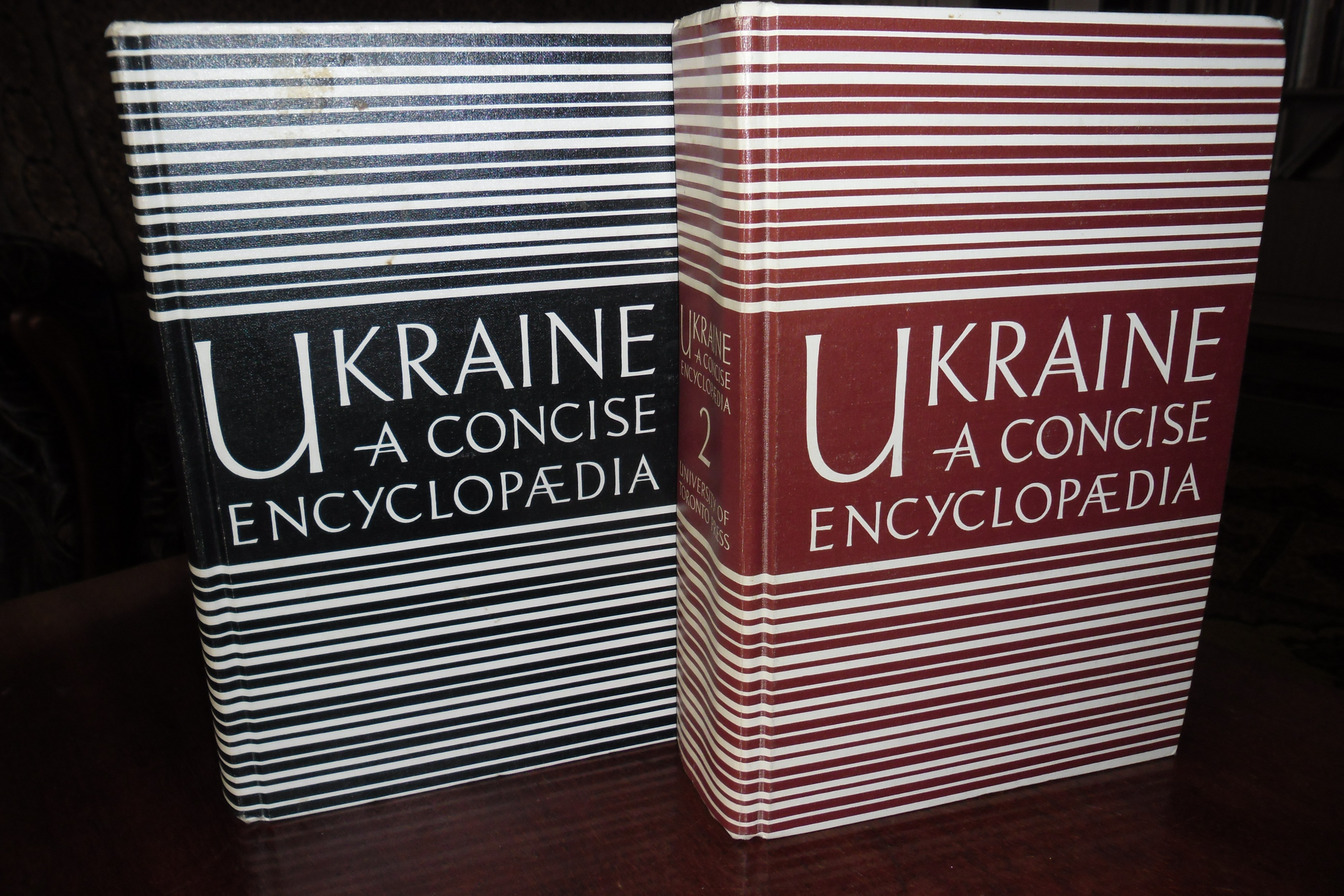 Енциклопедія: Фото